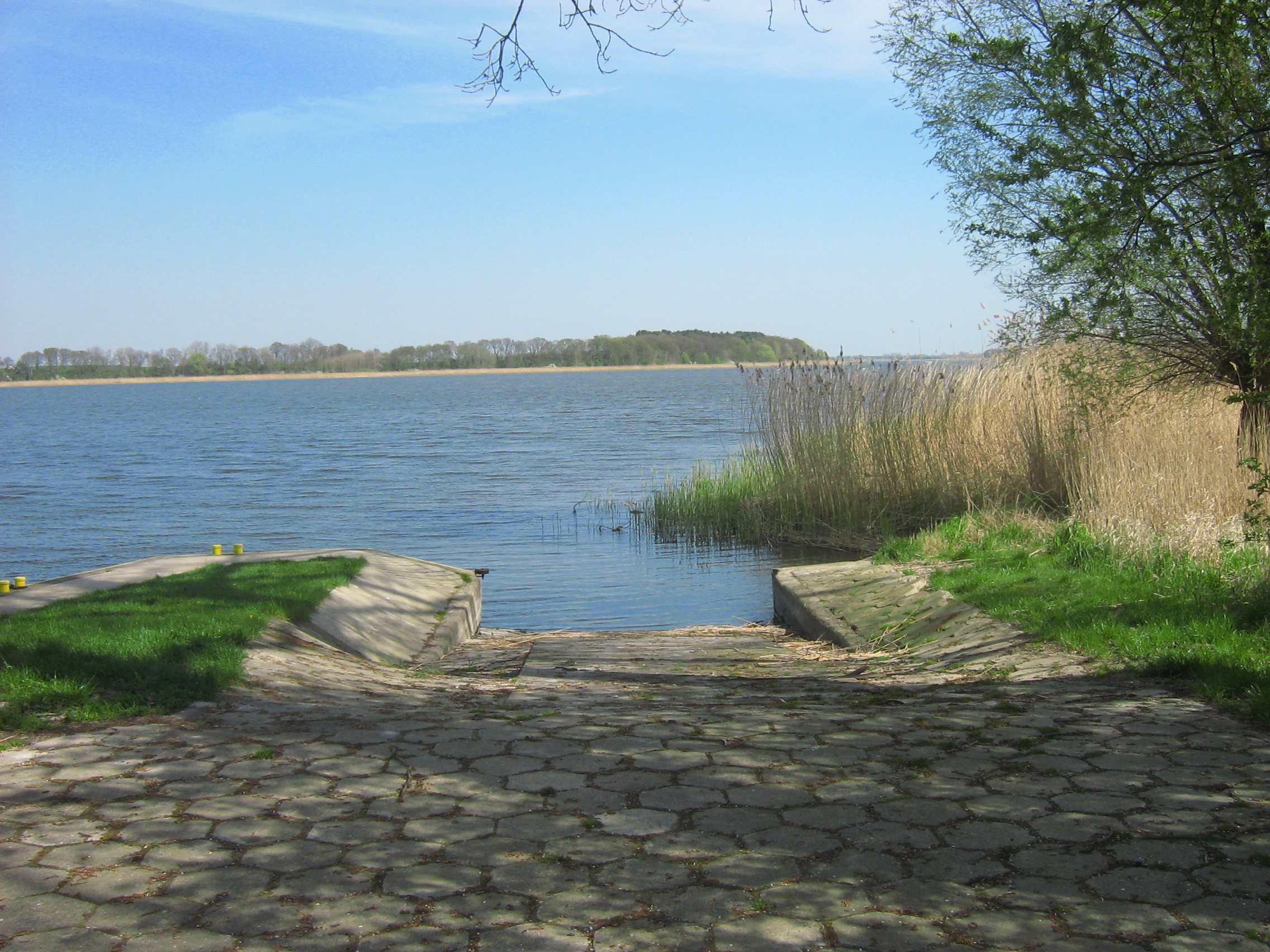 Slip w nabrzeżu wodnym w Sierosławiu